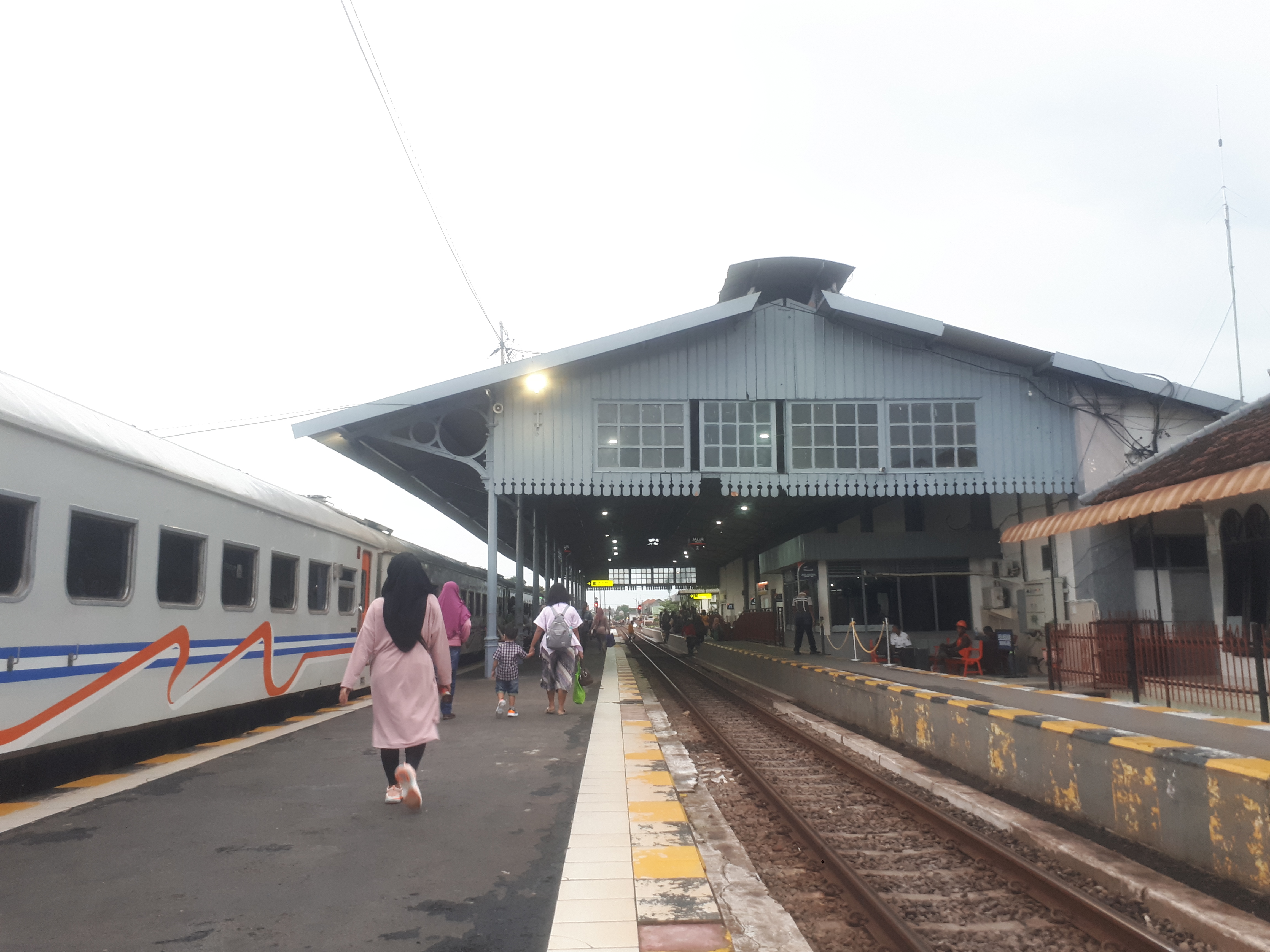 Emplasemen pada Stasiun Mojokerto tahun 2020